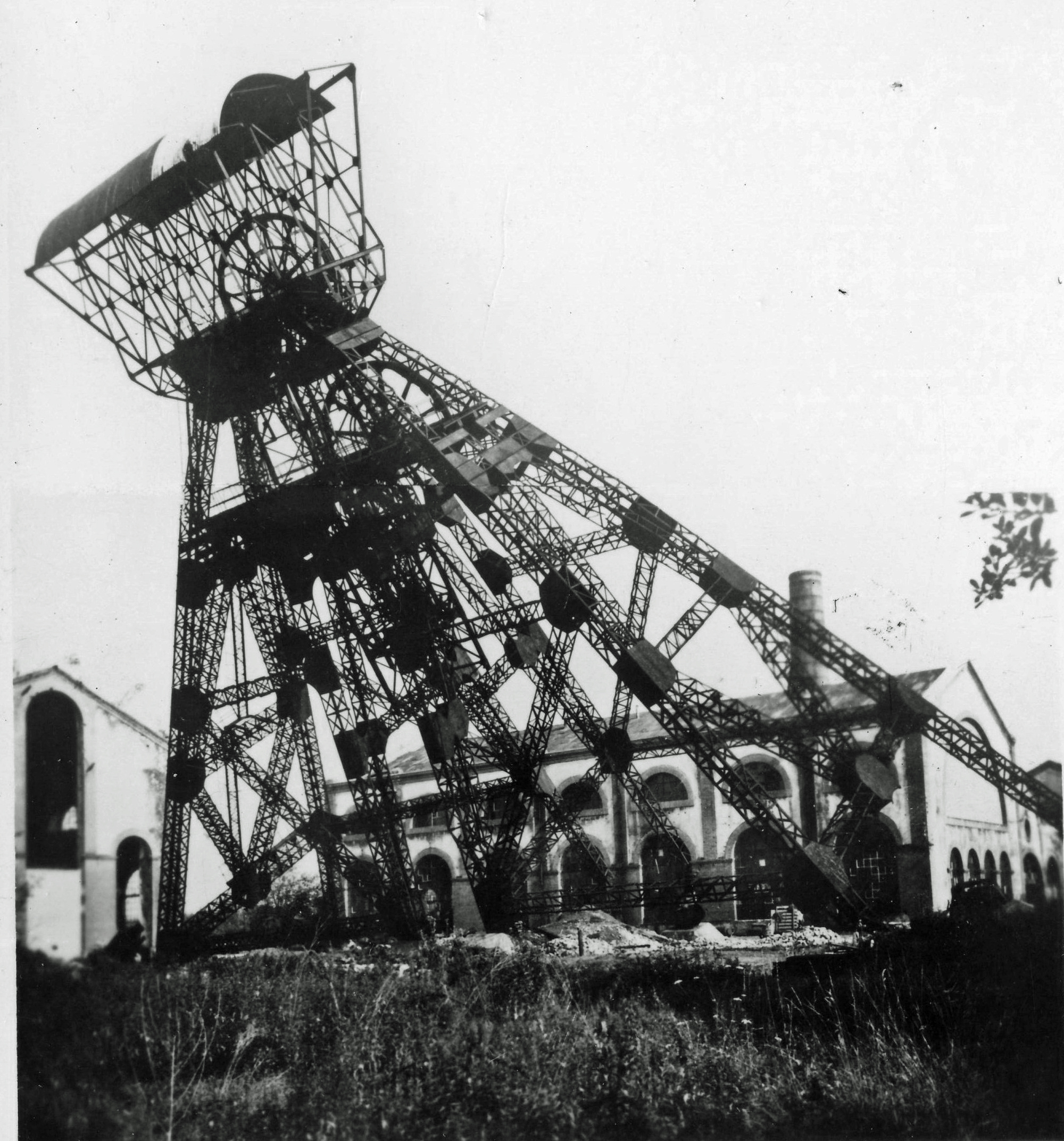 Démolition du chevalement puits A du siège Arthur-de-Buyer.